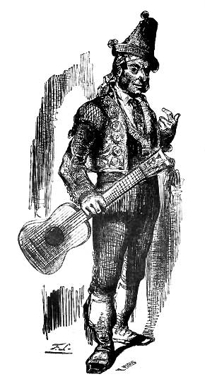 El Planeta, cantaor de flamenco. Grabado de Francisco Lameyer, siglo XIX.